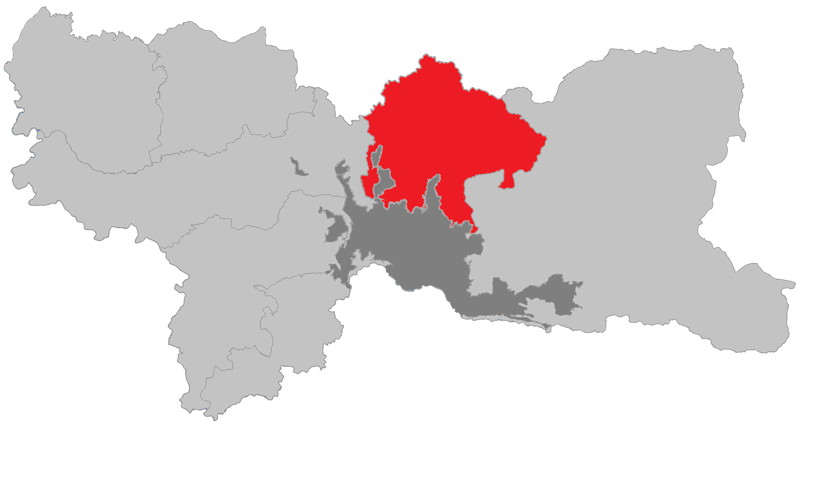 corregimiento de Manizales